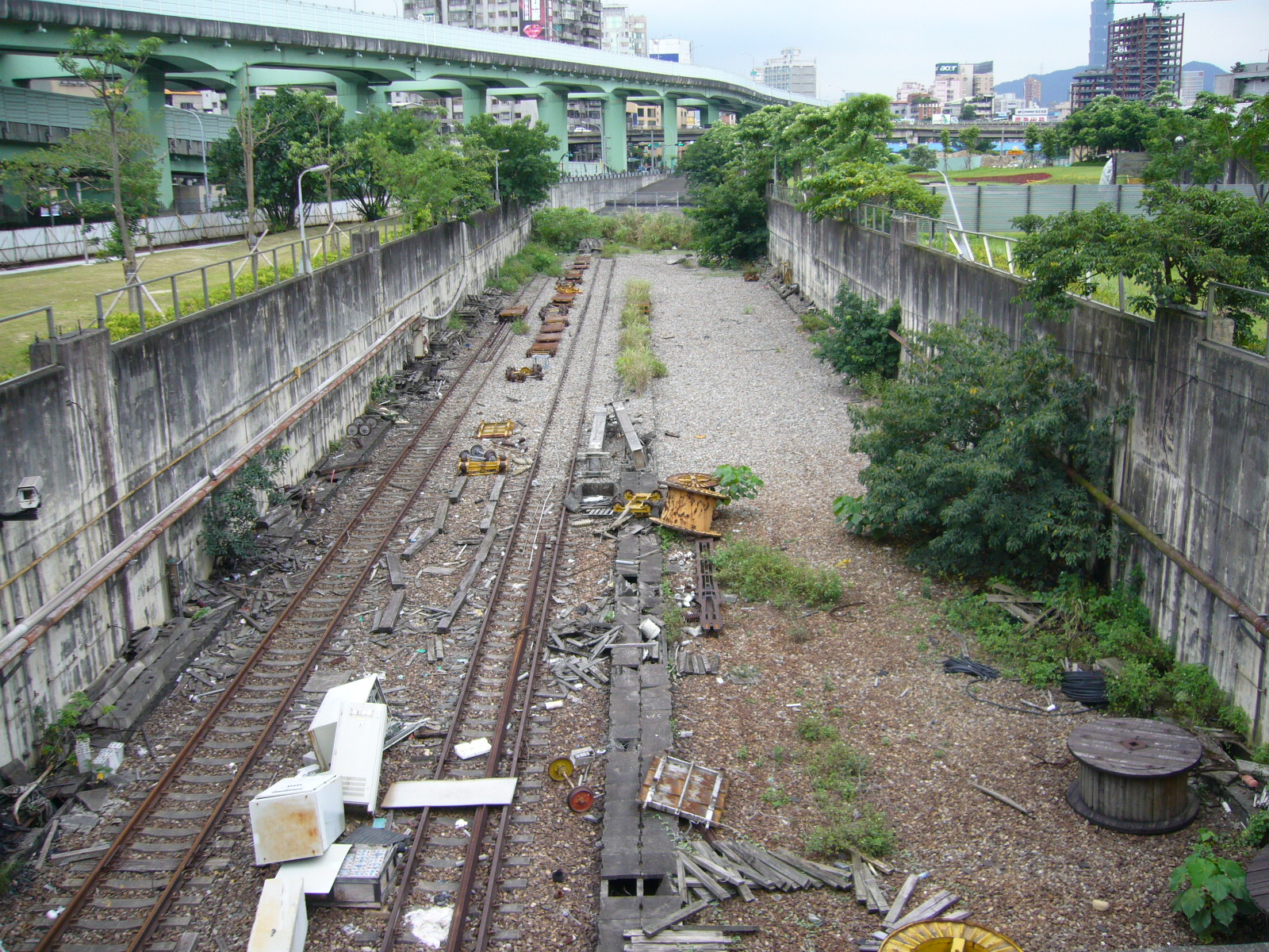 台北專案東隧道口／攝於華山車站舊址